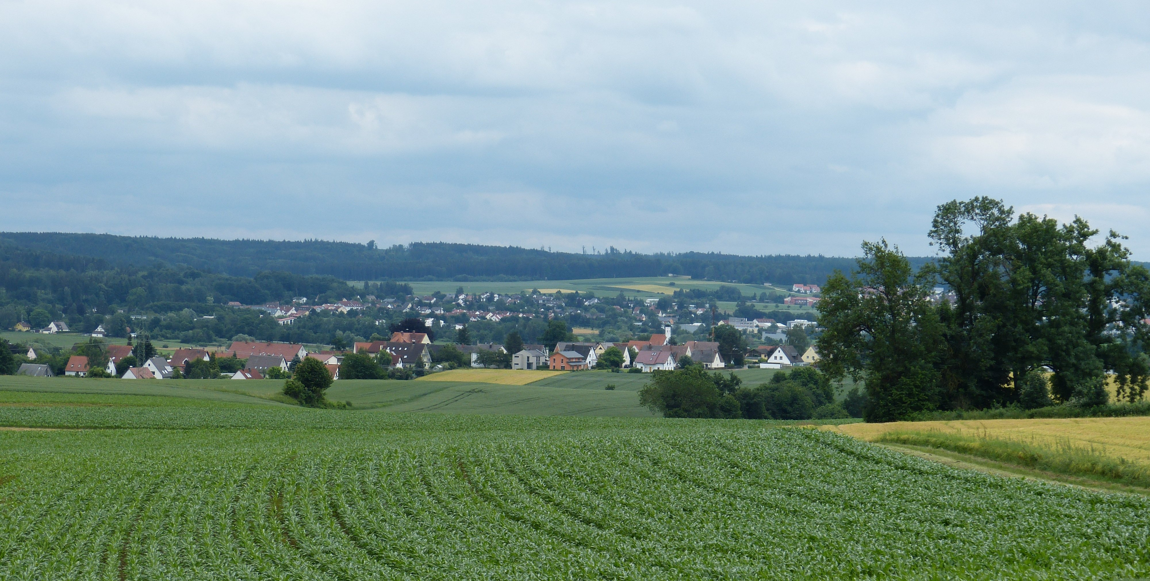 Schlipsheim, von einer Anhöhe am Waldrand bei Hainhofen fotografiert.